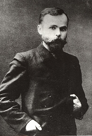 Александр Егорович Кропотов (31 марта 1874 — 1934) — крестьянин, эсер, депутат Государственной думы III созыва от Вятской губернии и Всероссйиского Учредительного собрания. Во время работы в Думе.